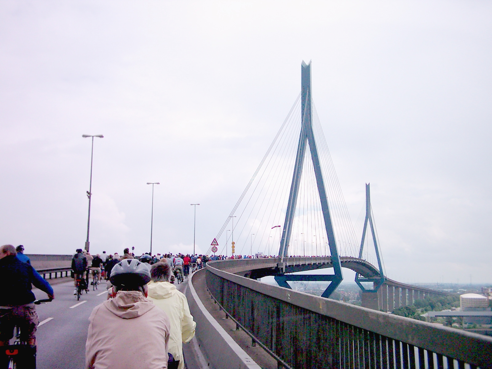 Fahrradsternfahrt in Hamburg am 17.06.07. Auf der Köhlbrandbrücke Richtung, Wilhelmsburg.